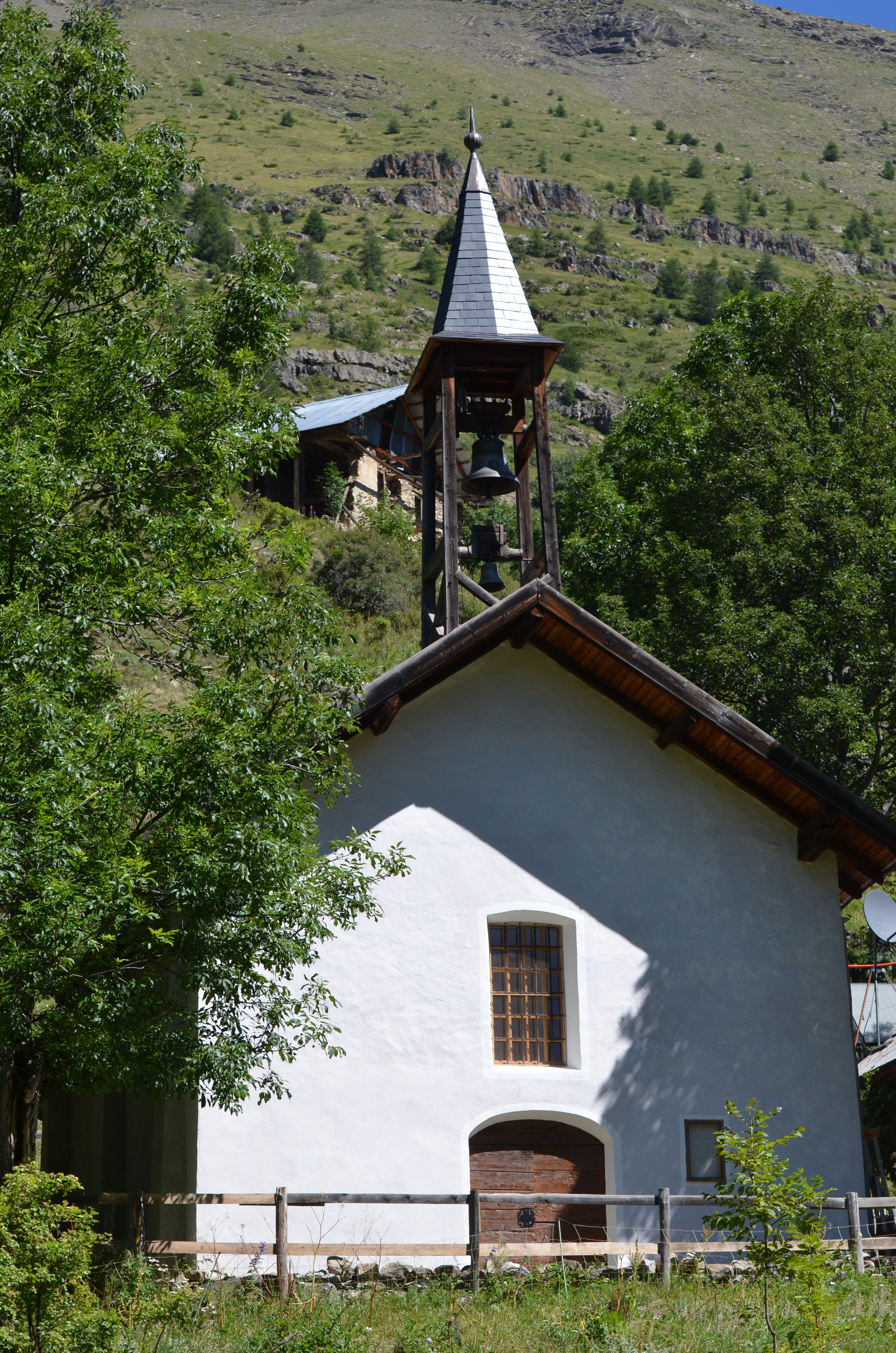 Le temple de Dormillouse, commune de Freissinières, Hautes-Alpes.